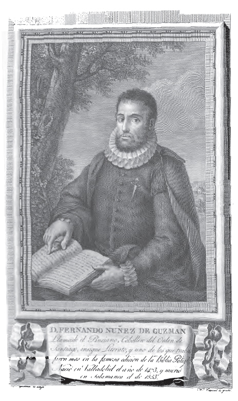 Retrato de Fernando Nuñez de Guzmán.